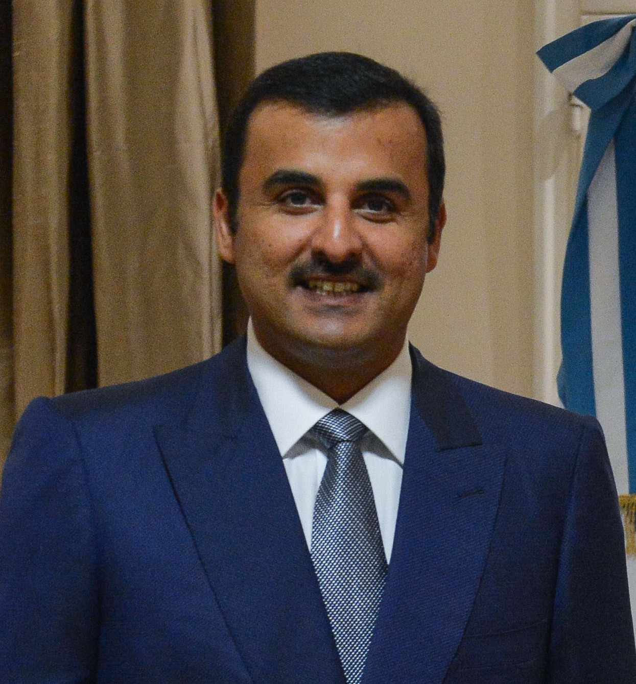 El presidente Mauricio Macri recibió al Emir de Qatar, Sheik Tamim bin Hamad Al Thani, con el objetivo de incrementar la cooperación y el comercio bilateral y fomentar la inversión para áreas clave del país como agroindustria, infraestructura y energía.